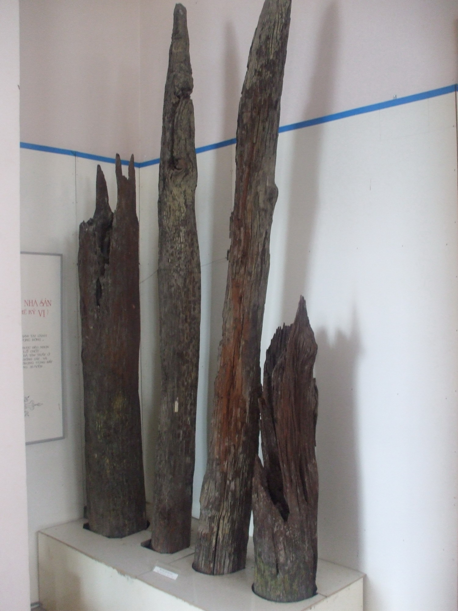 Bộ cọc gỗ cột nhà sàn của cư dân Phù Nam. Hiện vật đang được trưng bày tại Bảo tàng An Giang.